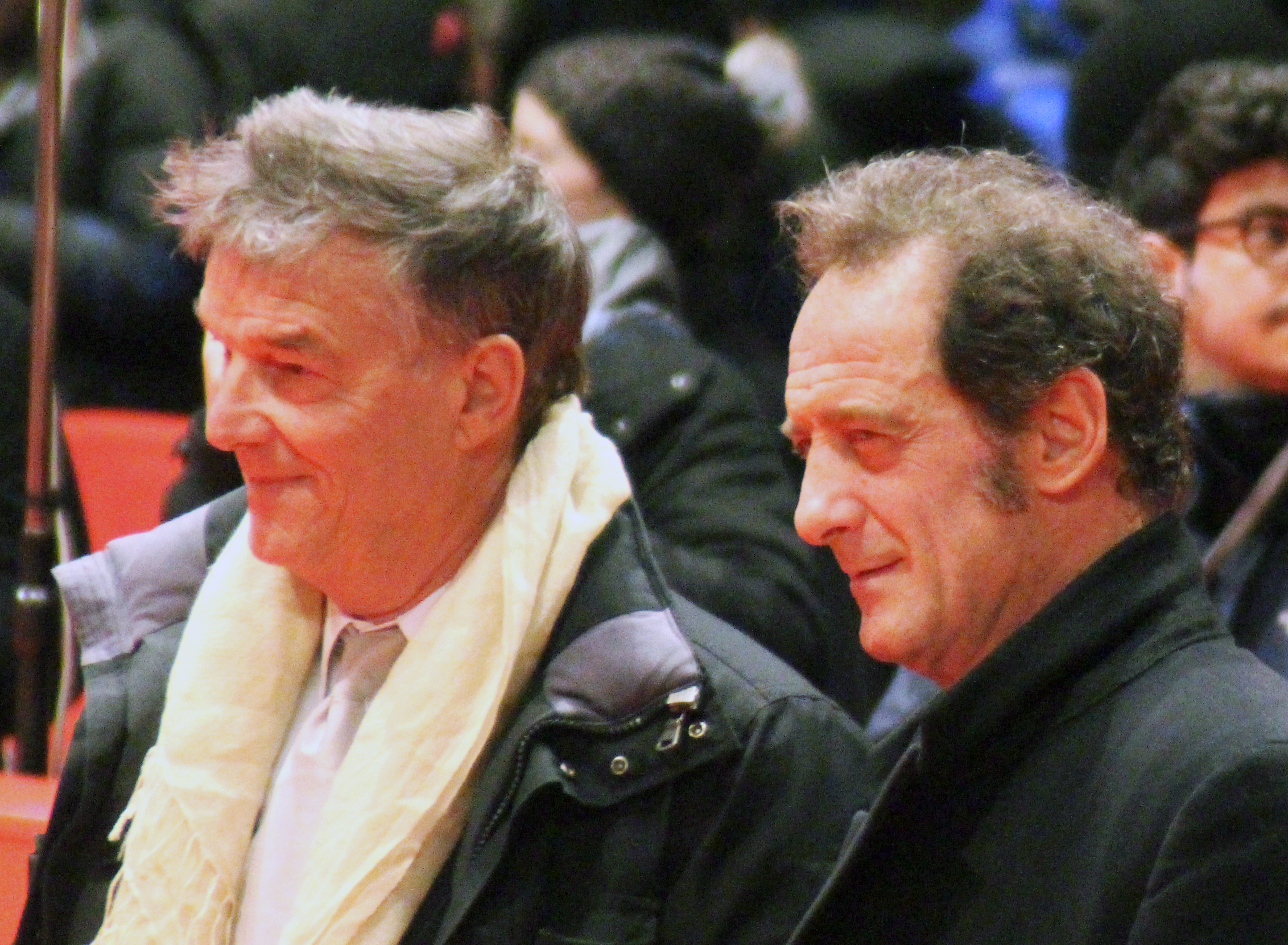 Benoît Jacquot und Vincent Lindon auf dem roten Teppich zur Premiere ihres Films Journal d’une femme de chambre bei der Berlinale 2015